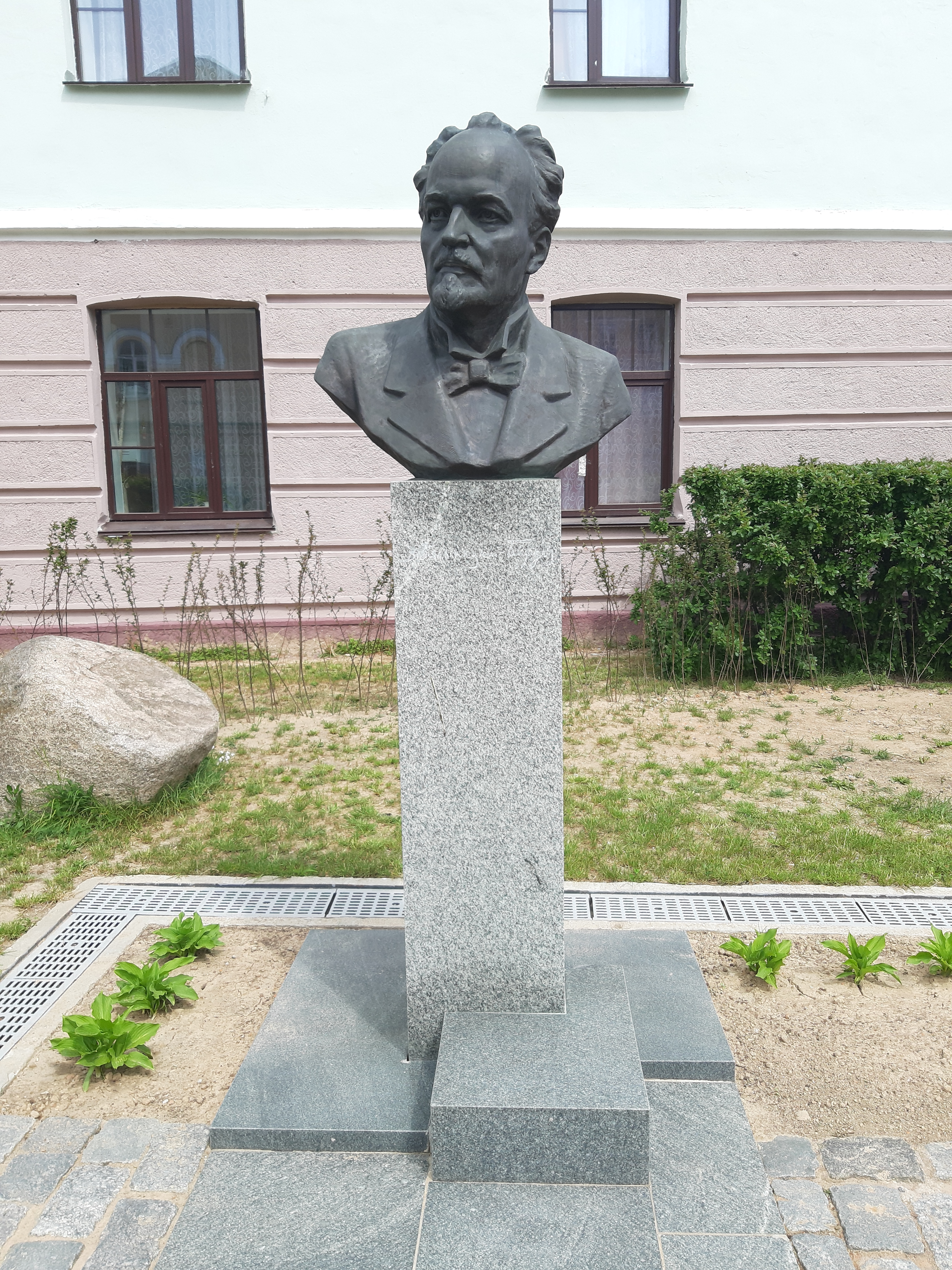 Магілёў. Па Ленінскай